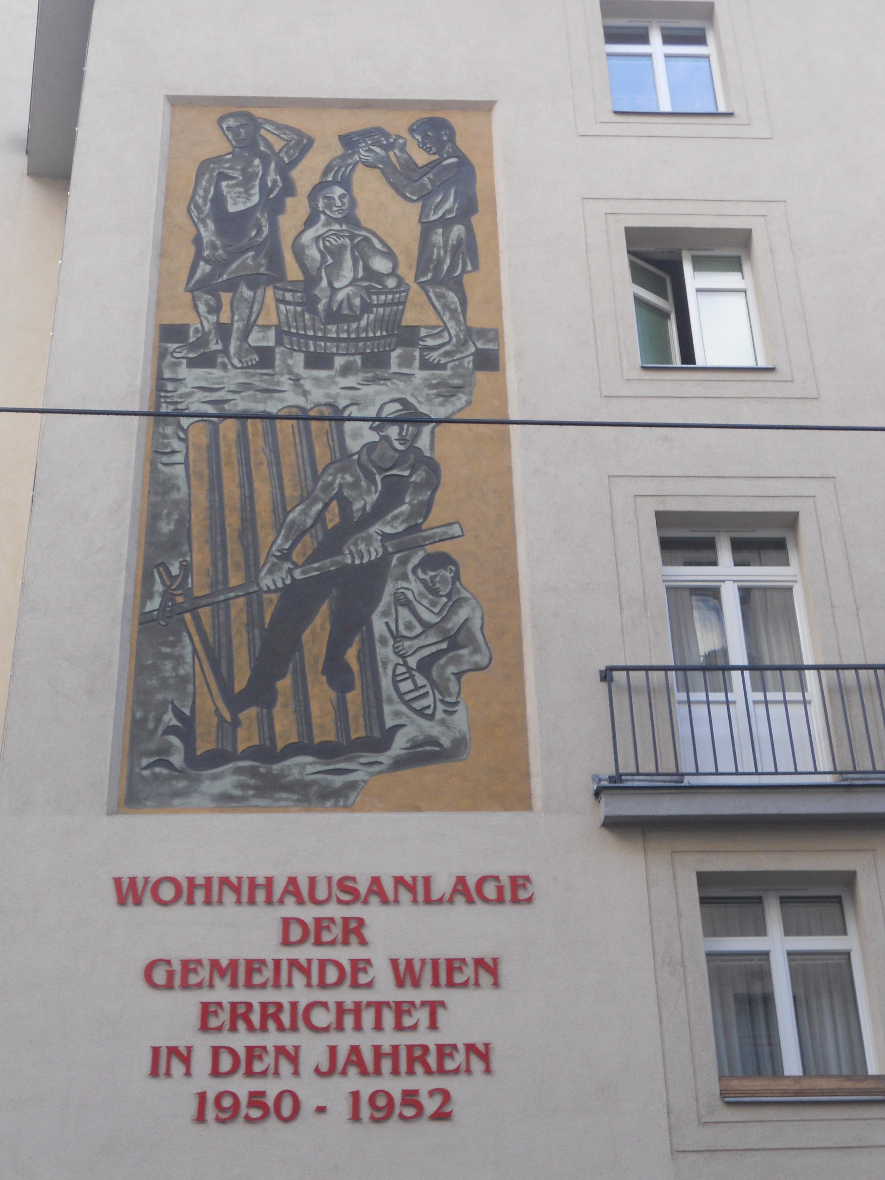 Sgraffito-Wandbild "Donauflößer-Badeszene" von Heribert Potuznik am Karl-Schönherr-Hof